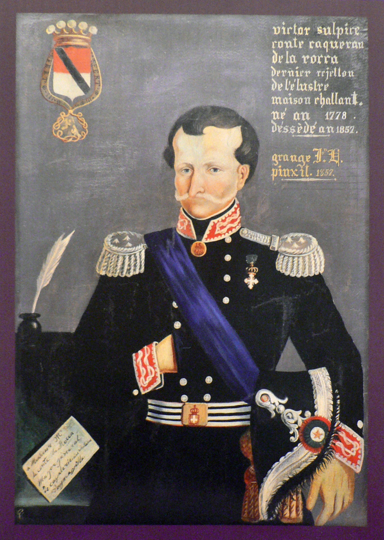 ritratto di Vittorio Cacherano Osasco della Rocca-Challant, esposto al Castello di Aymavilles.